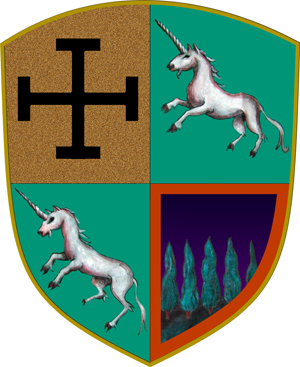 Stemma Marino Marzano (Sessa Aurunca, 1420 c.ca – Napoli, 1490 / 1464).